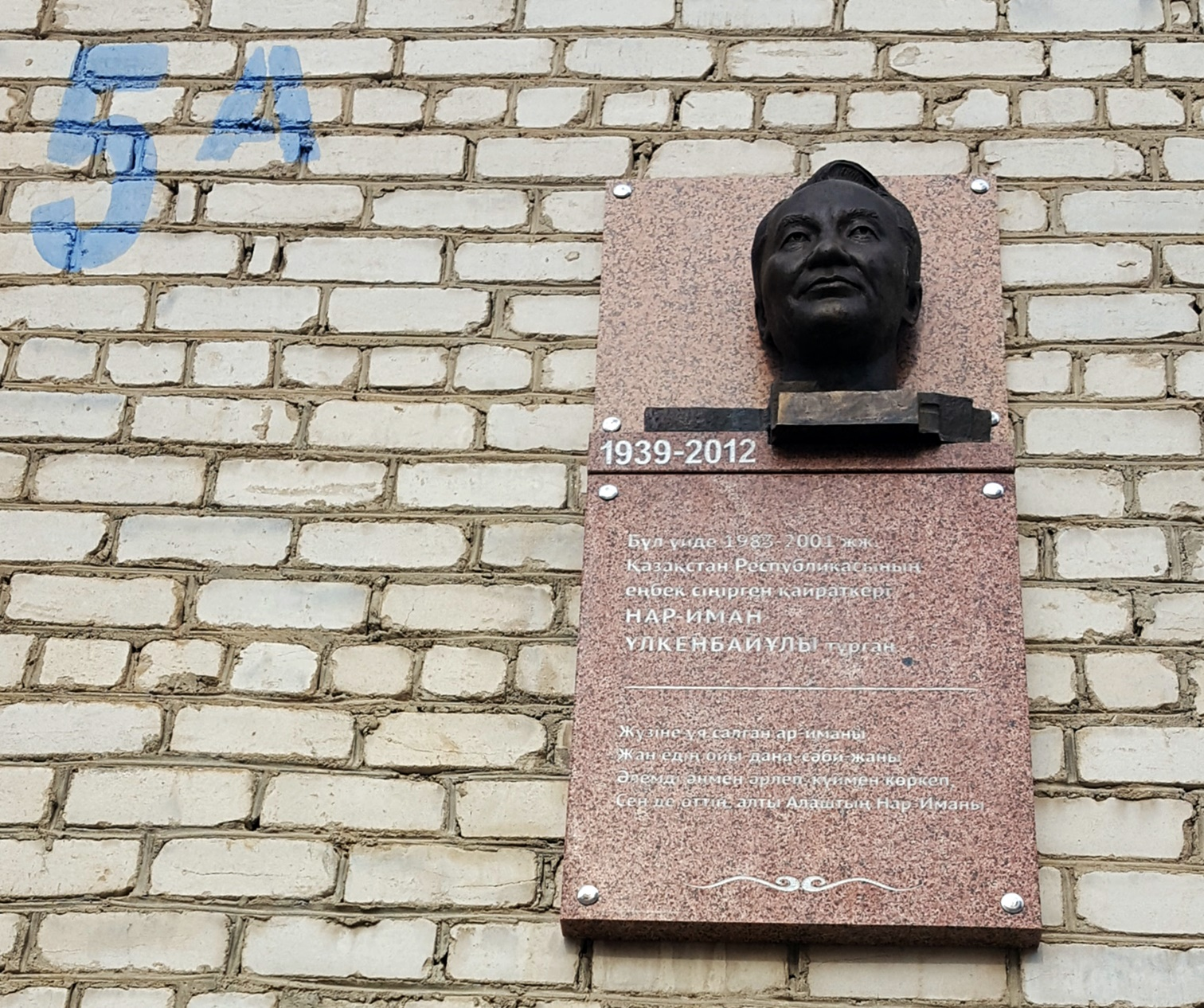 Қазақша (кирил): Нариман Үлкенбаевқа арналған ескерткіш тақта. Атырау қаласы, Сәтпаев к., 5а үй.